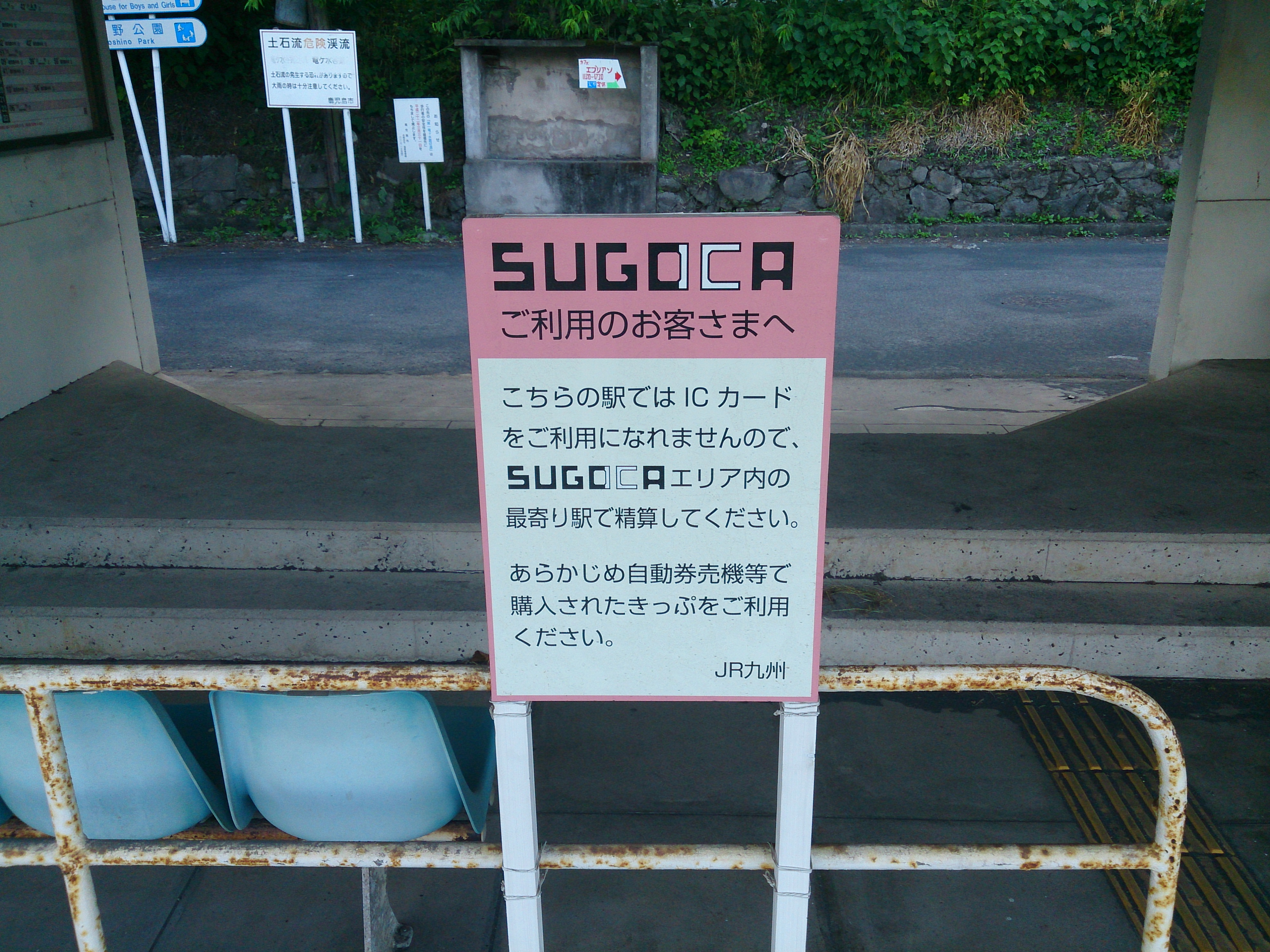 ICカード注意喚起の看板